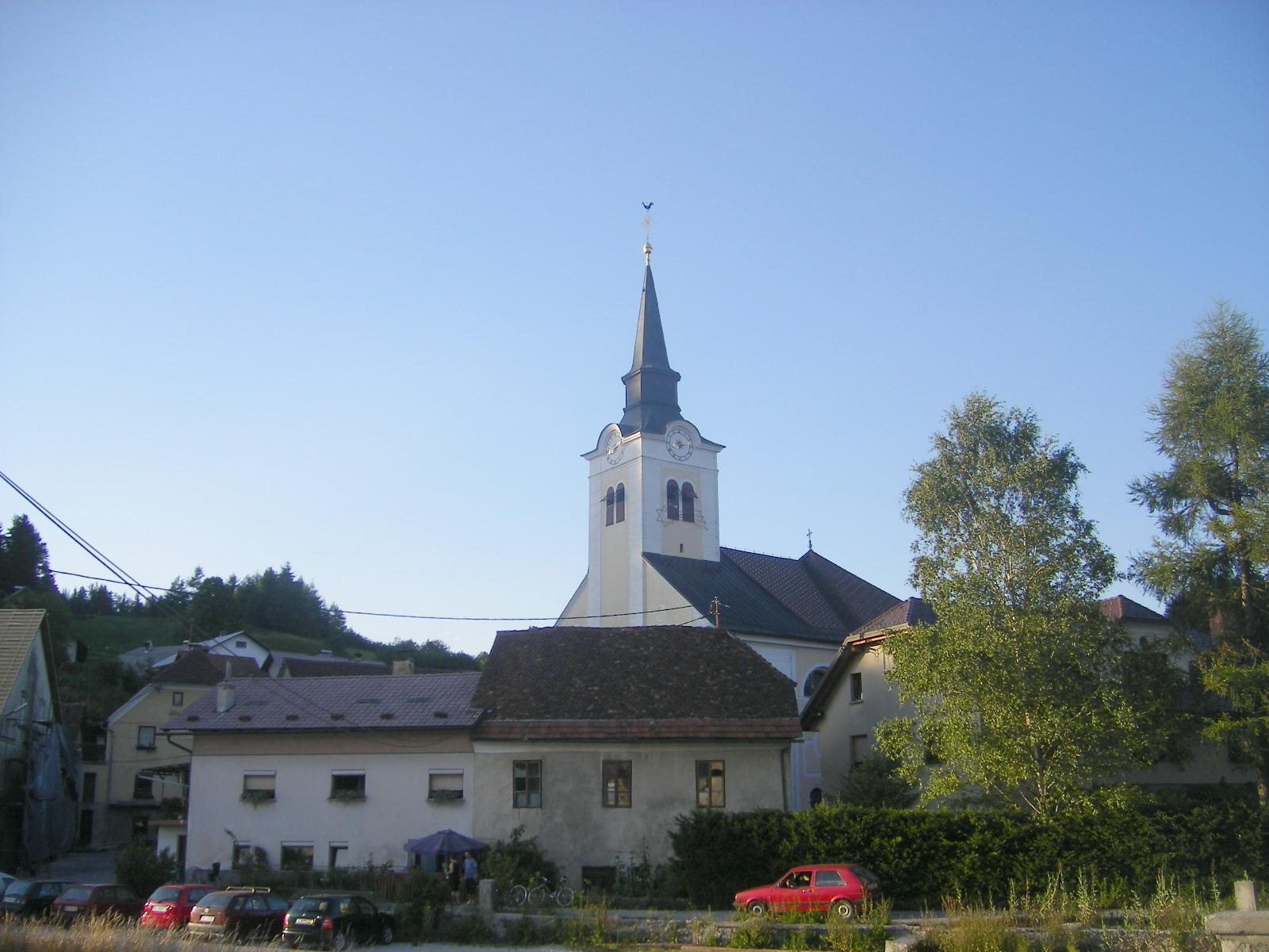 Logatec